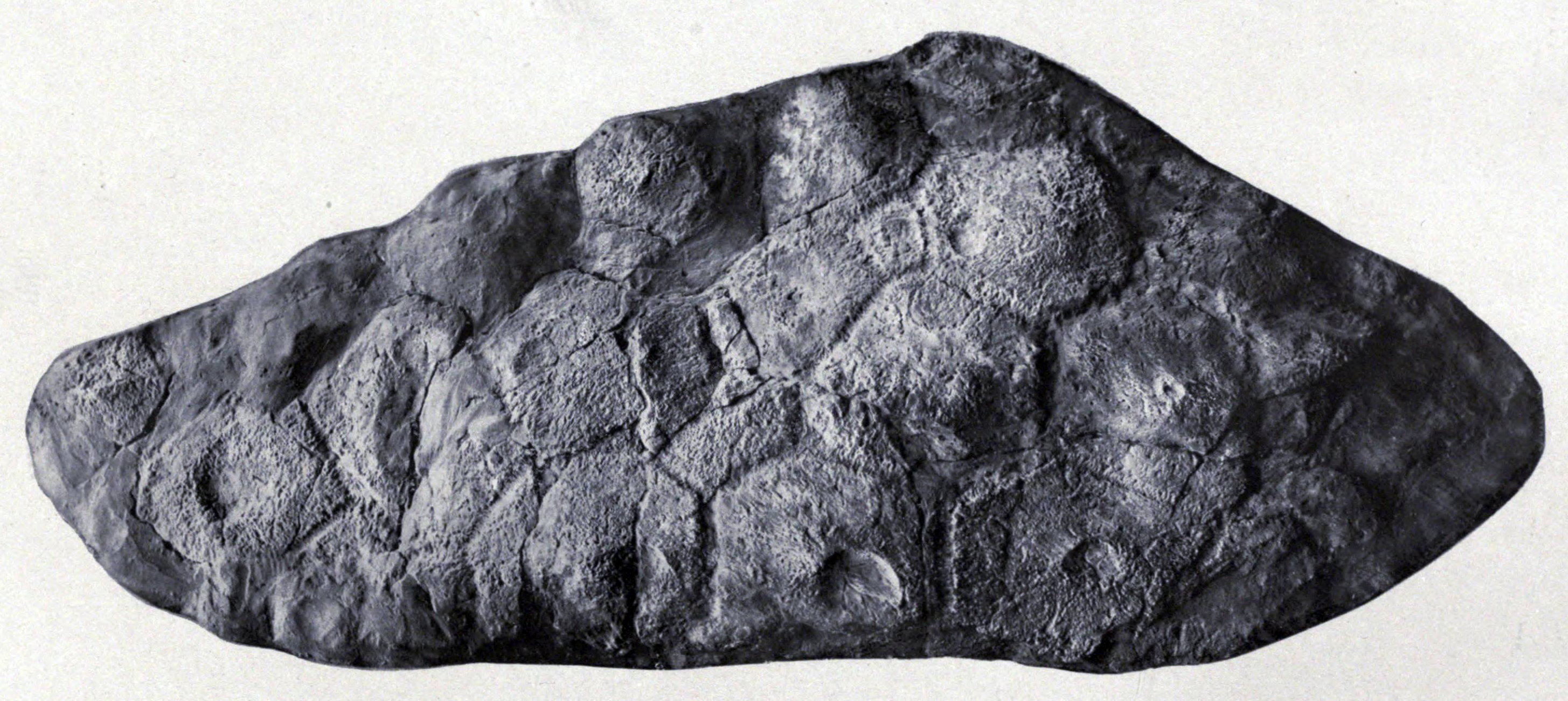 Stegopelta pelvic armor.